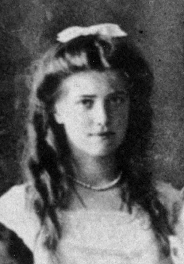 Detalhe da Grã-duquesa Maria Nikolaevna Romanova retirado de uma fotografia de família de 1913